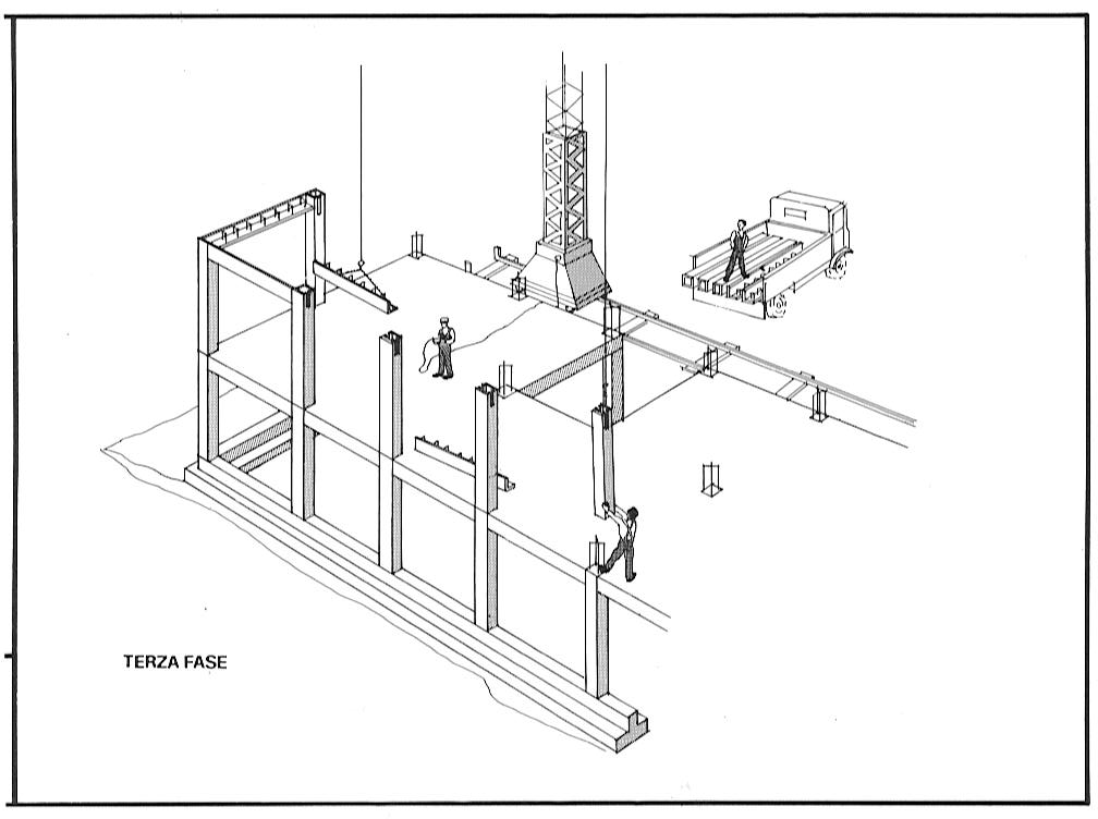 Structurapid - terza fase